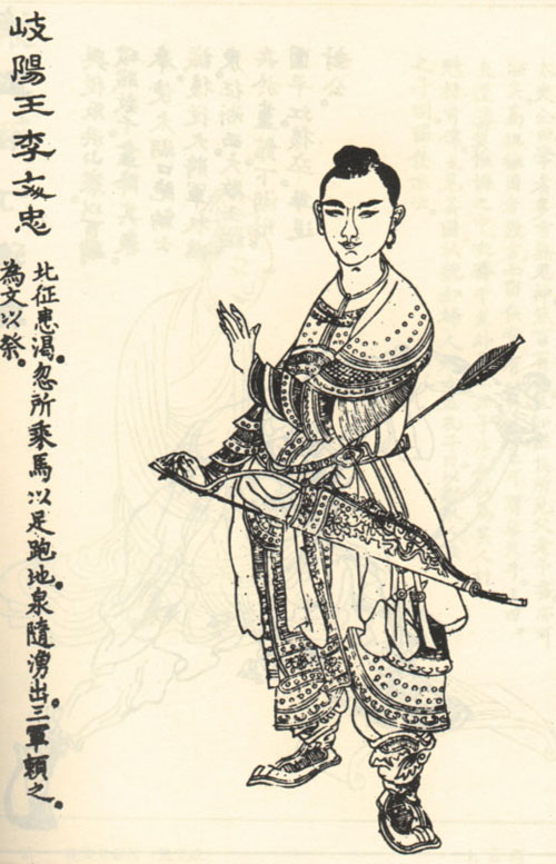 李文忠，明朝军事將領。